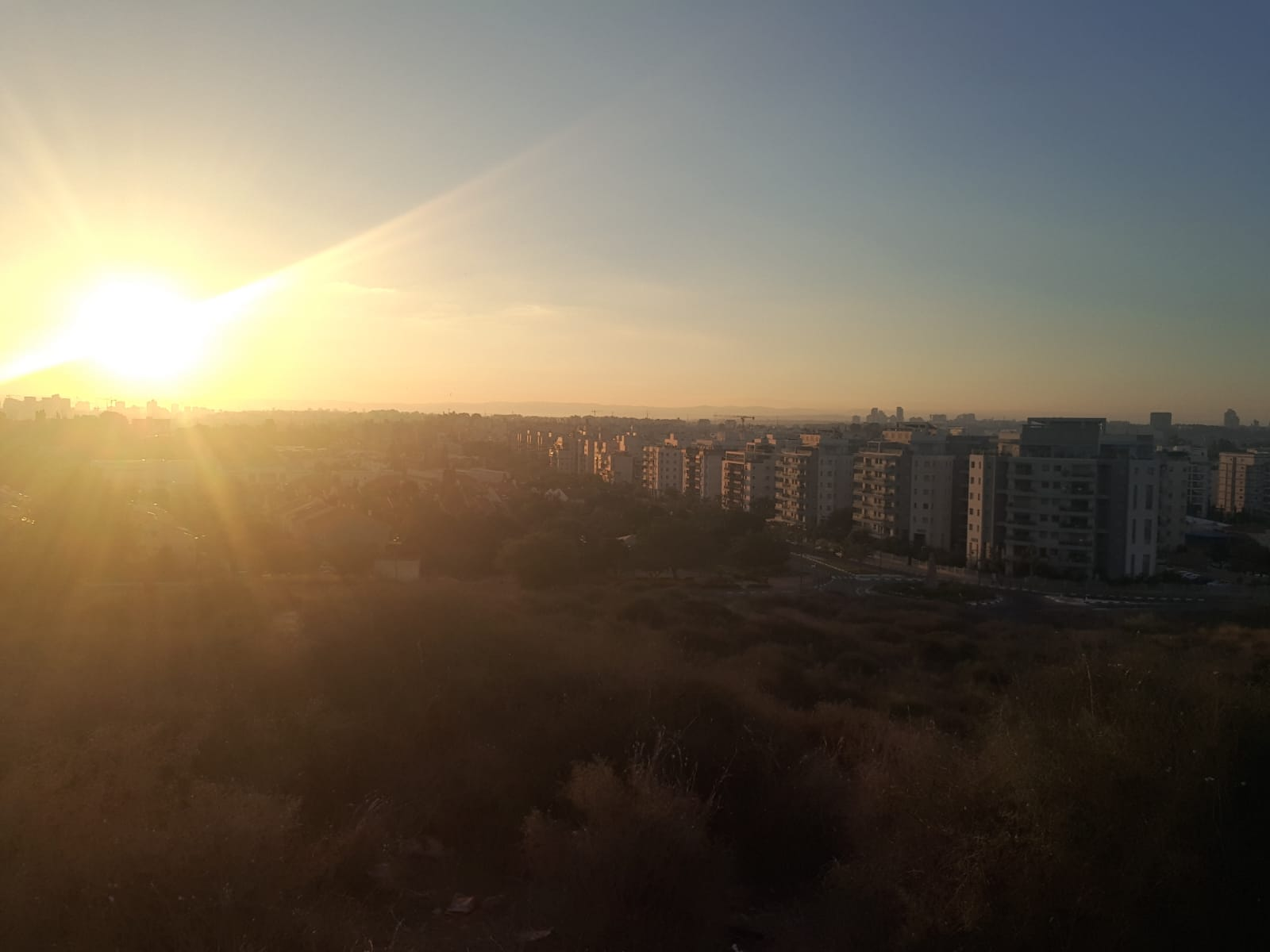 גן לאומי גבעות הכורכר נס ציונה והעיר נס ציונה בזריחה.